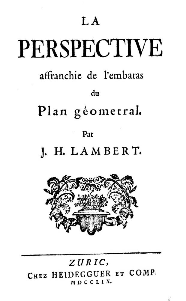 La perspective affranchie de l'embarras du plan géometral. Par J.H. Lambert. - Zuric : chez Heidegguer et comp., 1759. - [8], 192, [2] p., VI c. di tav. : ill. ; 8º. - Tavole calcografiche incise da J.R. Holzhalb .